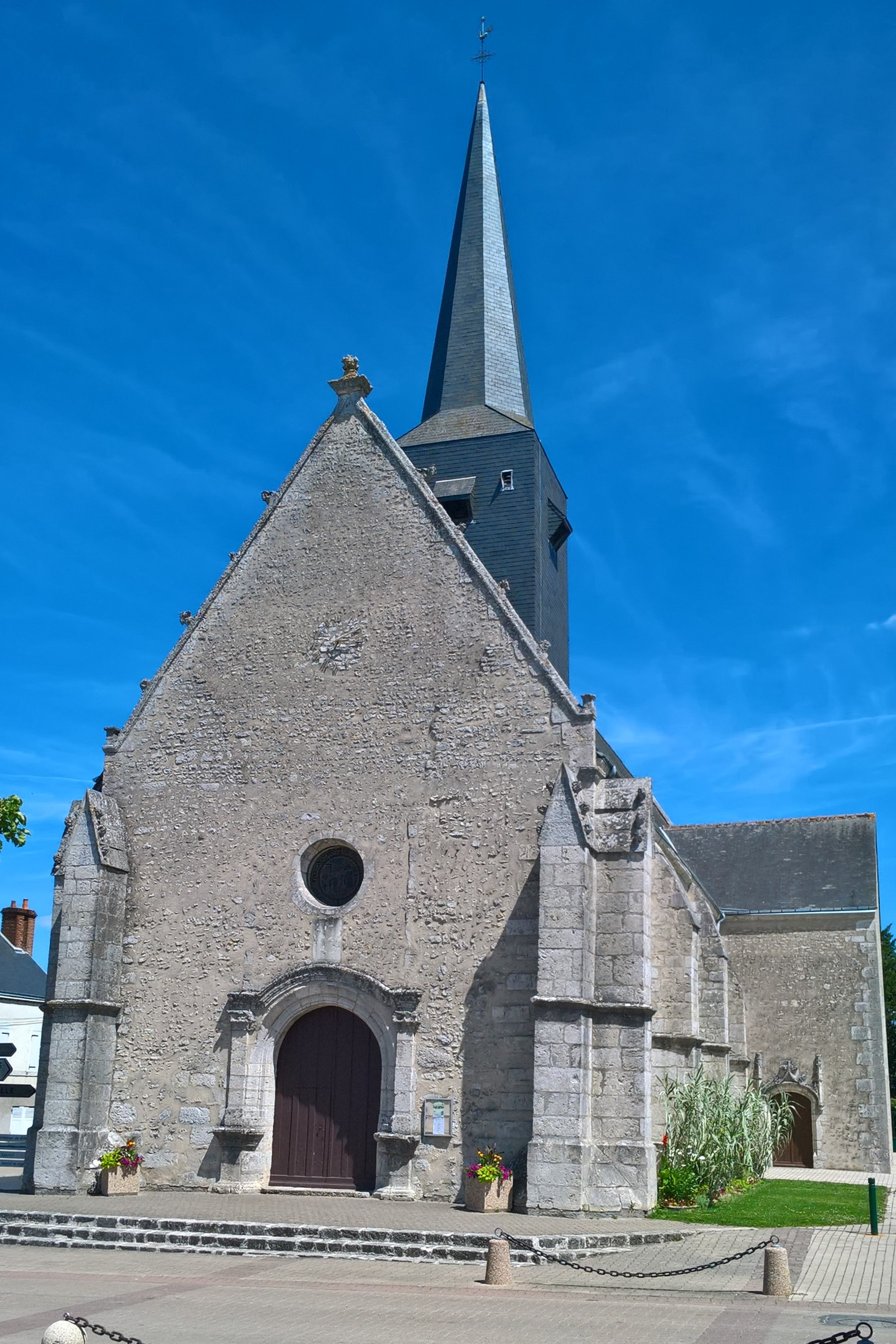 Ouzouer-le-Marché, église